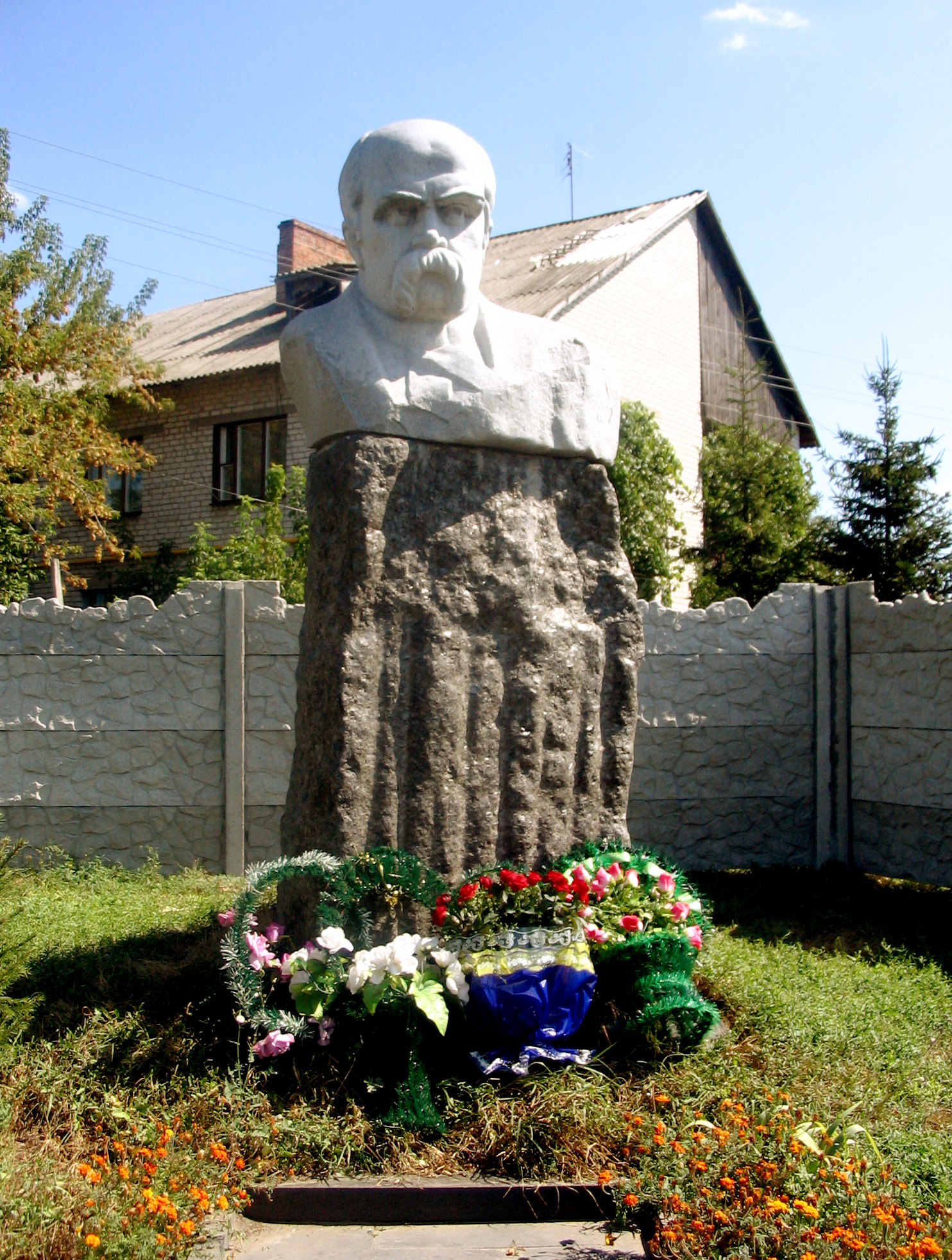 Пам'ятник Т.Г. Швеченко в смт. Брусилів